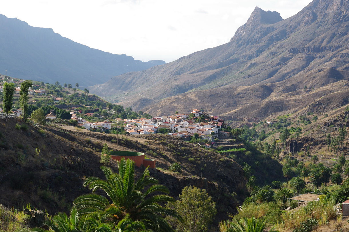 Blick nach Fataga, Gran Canaria